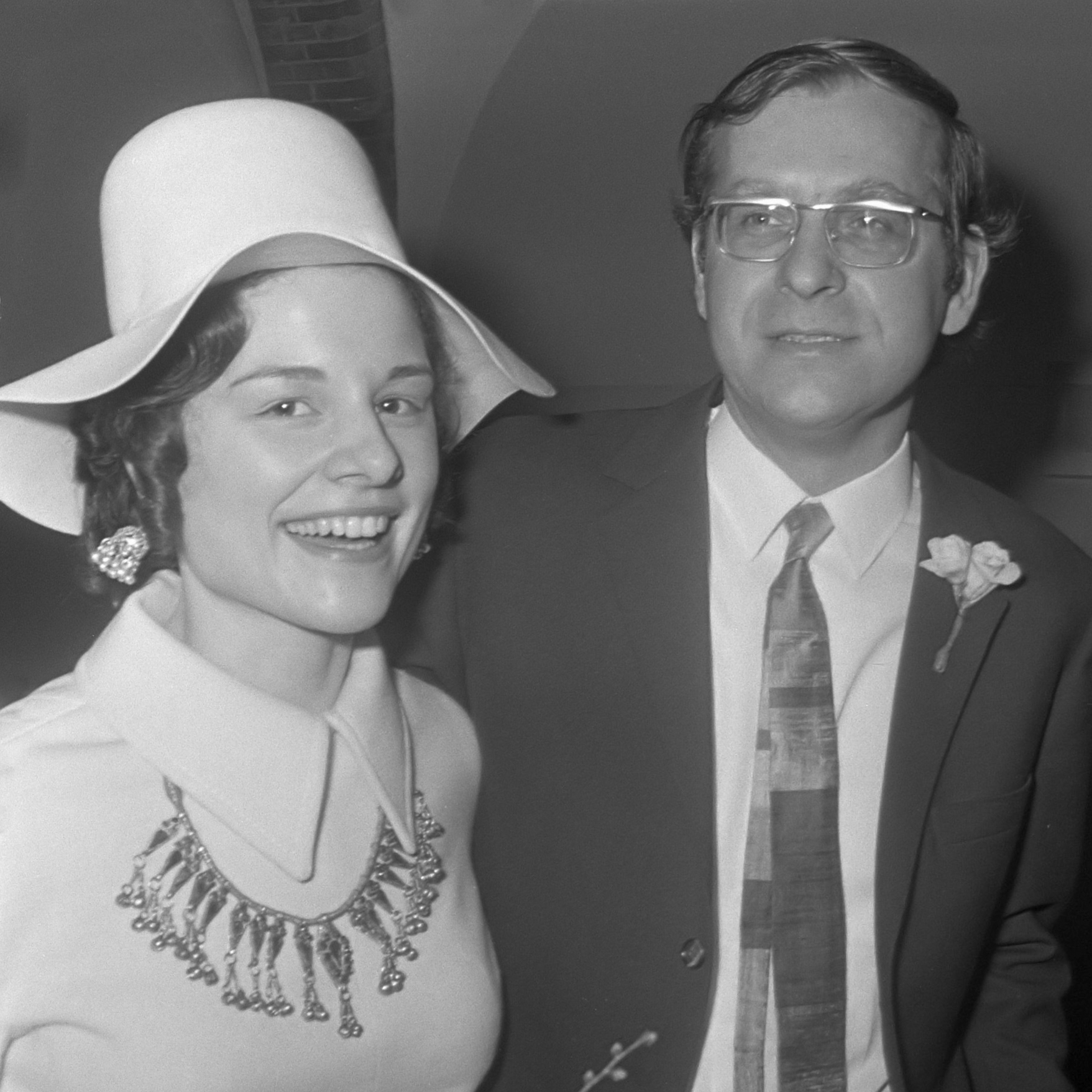 Huwelijk studentenpastoor Huub Oosterhuis met Josefien Melief